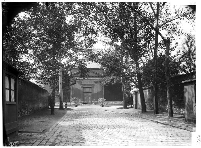 Entrée et allée